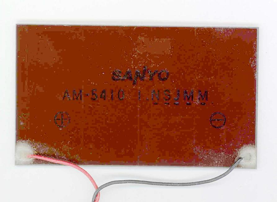 Rückseite amporphe Dünnschicht-Solarzelle; andere Versionen: zu solarz3a.jpg